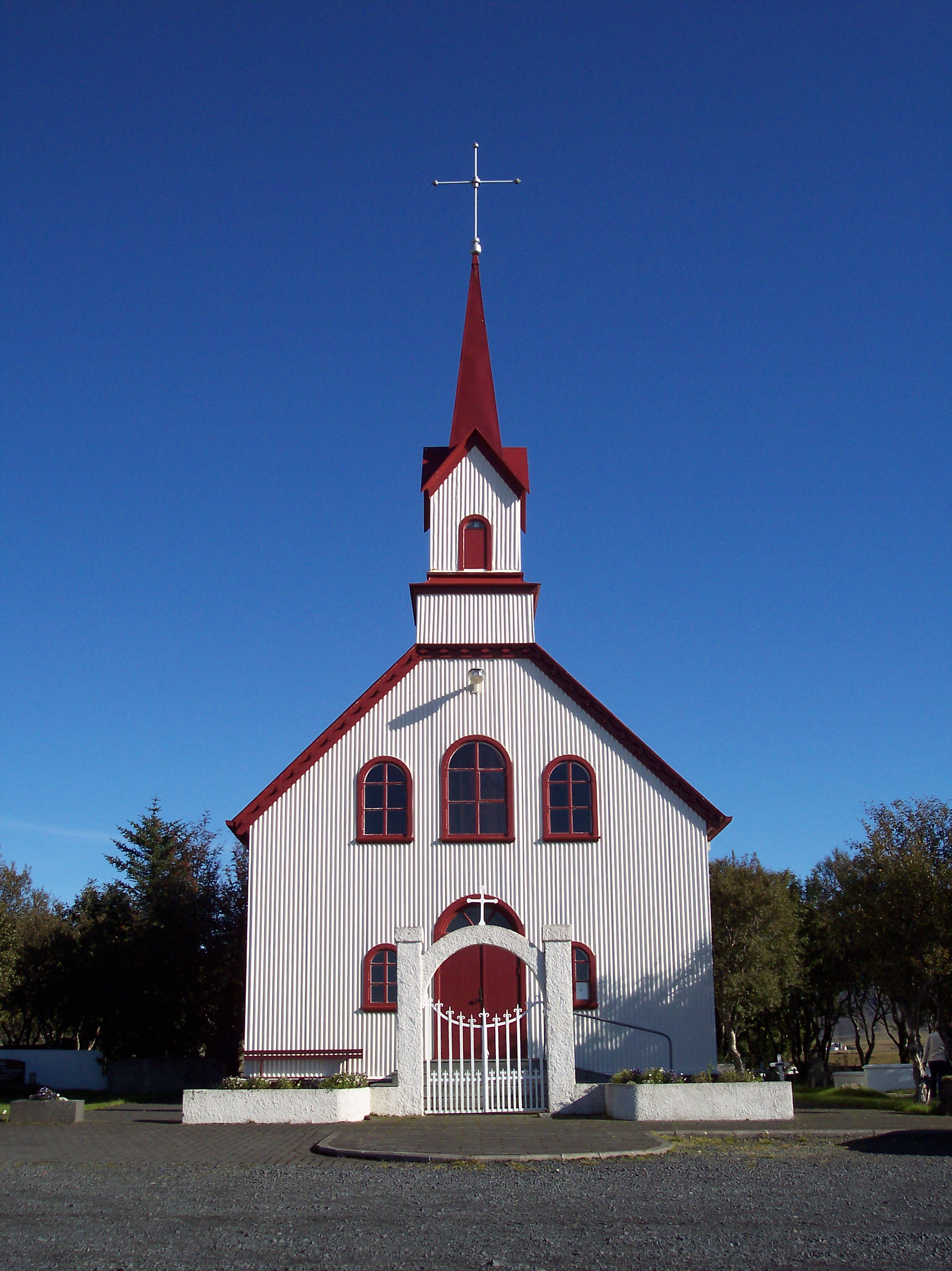 Kotstrandarkirkja, Iceland